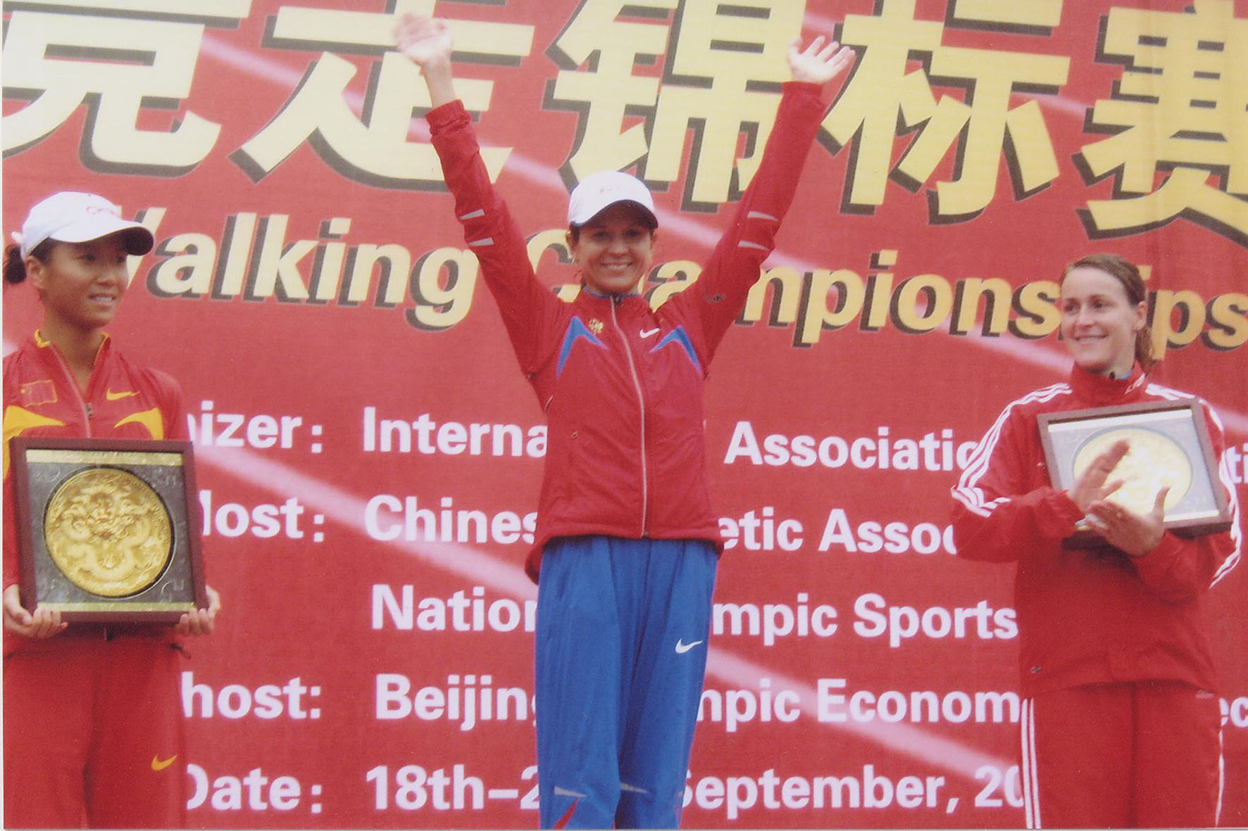 Награждение победителей финала Вызова ИААФ в Пекине (AAF Race Walking Challenge 2010)